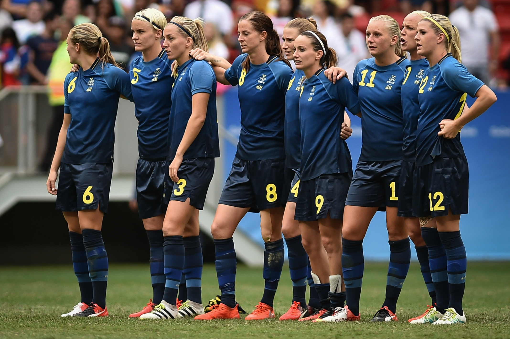 Estádio Nacional de Brasília Mané Garrincha, Brasília, DF, Brasil, 12/8/2016 Foto: Andre Borges/Agência Brasília. Estados Unidos e Suécia jogam nesta sexta-feira (12), no Estádio Mané Garrincha, pelas quartas de final do futebol feminino na Olimpíada 2016.